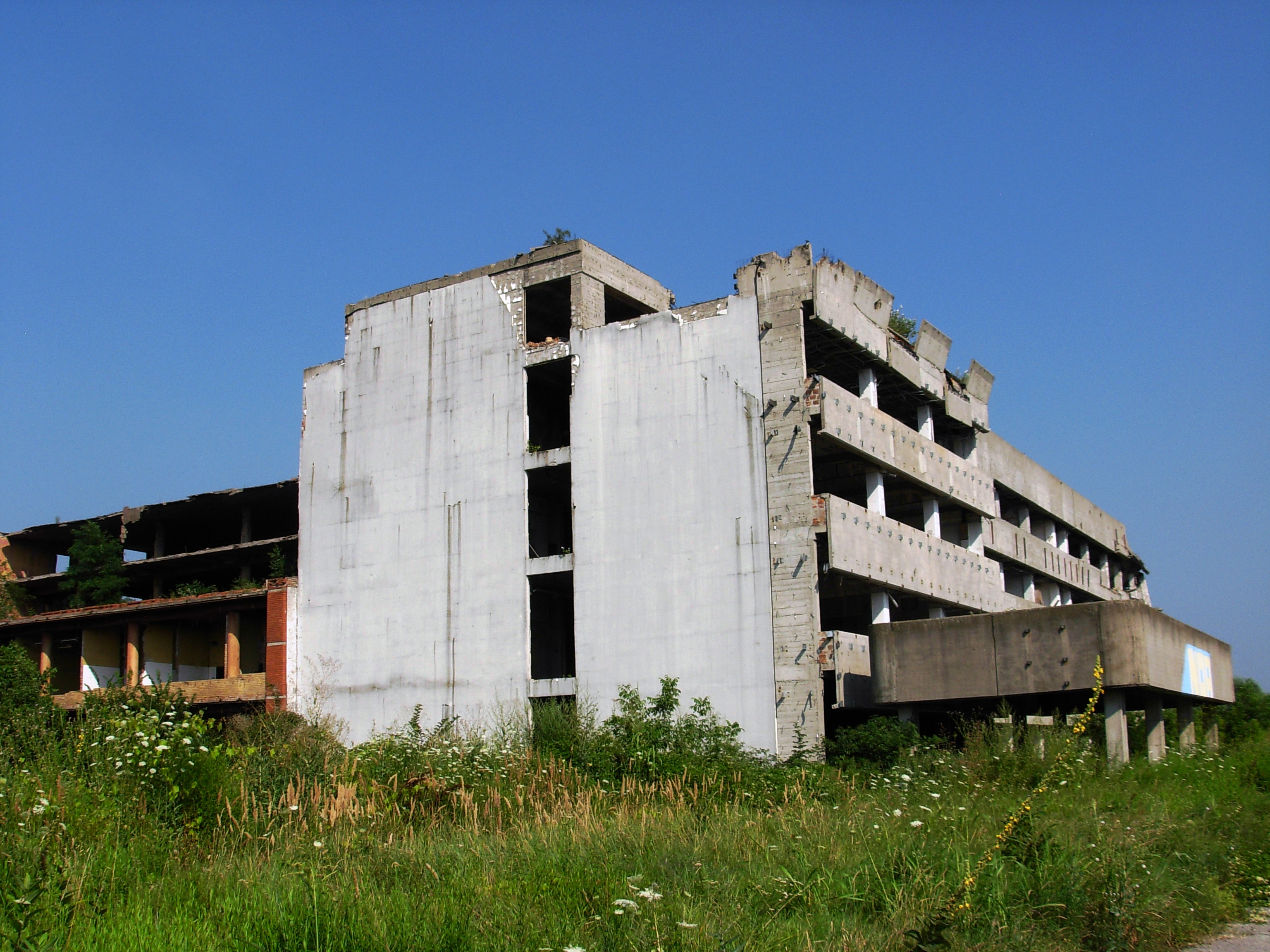 Televizija RTV srušena u NATO bombardovanju 1999. godine. Slikano sa prednje strane.